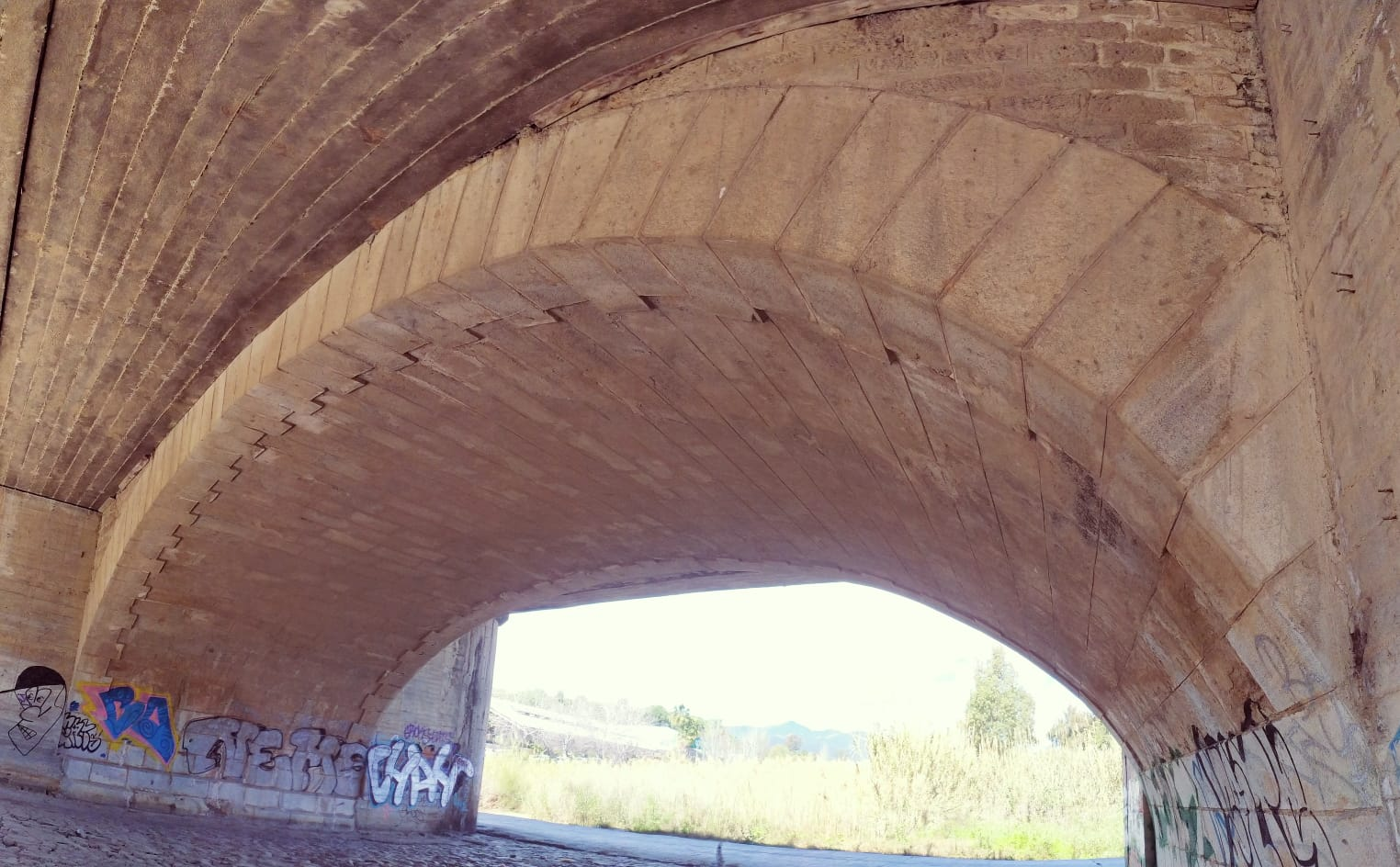 Puente Fosil o de Guadalmansa